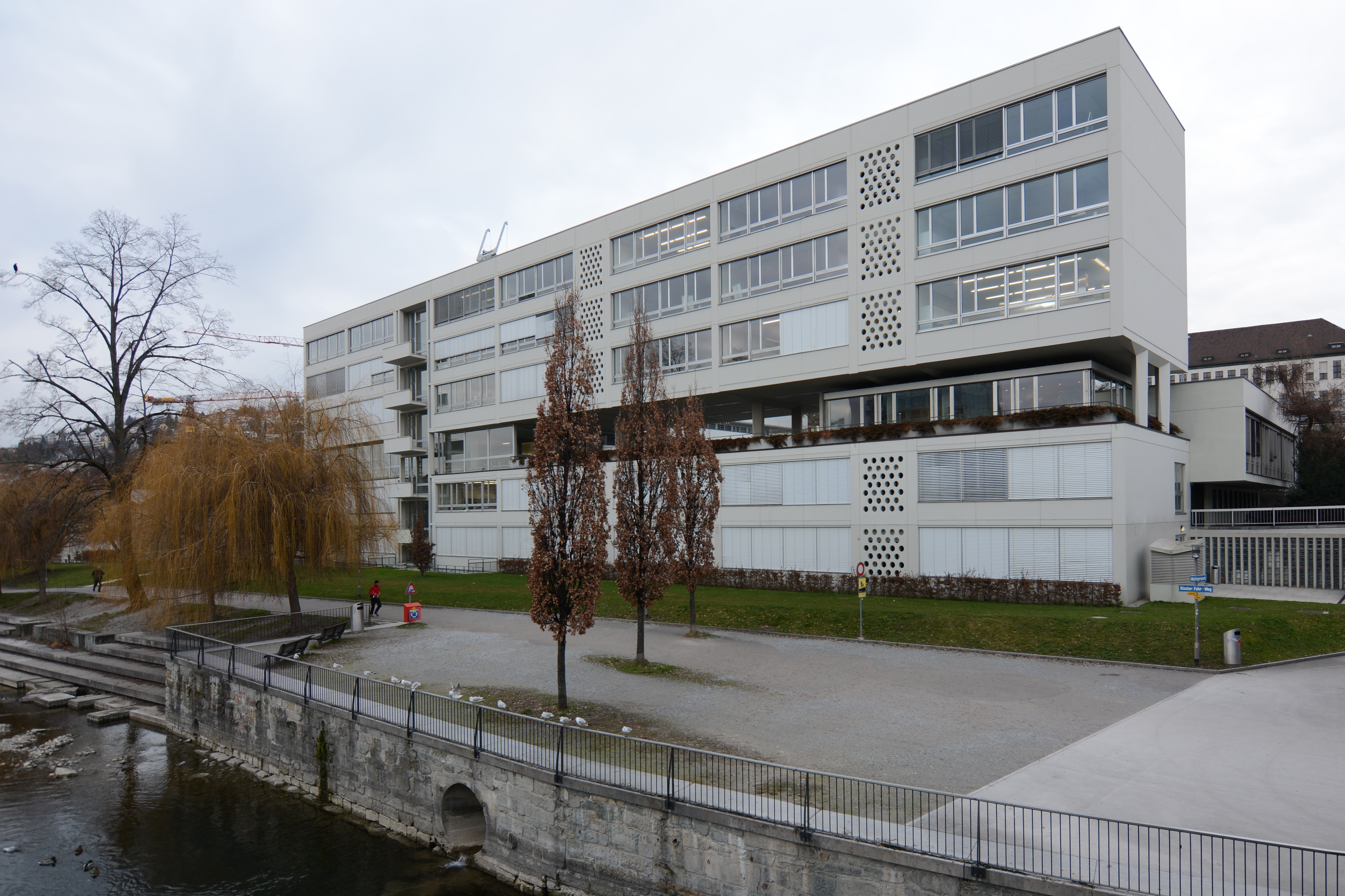 Kreisgebäude 10, Fachschule und Musikpavillon der Stadt Zürich, Architekt: Ernst Schindler, 1964